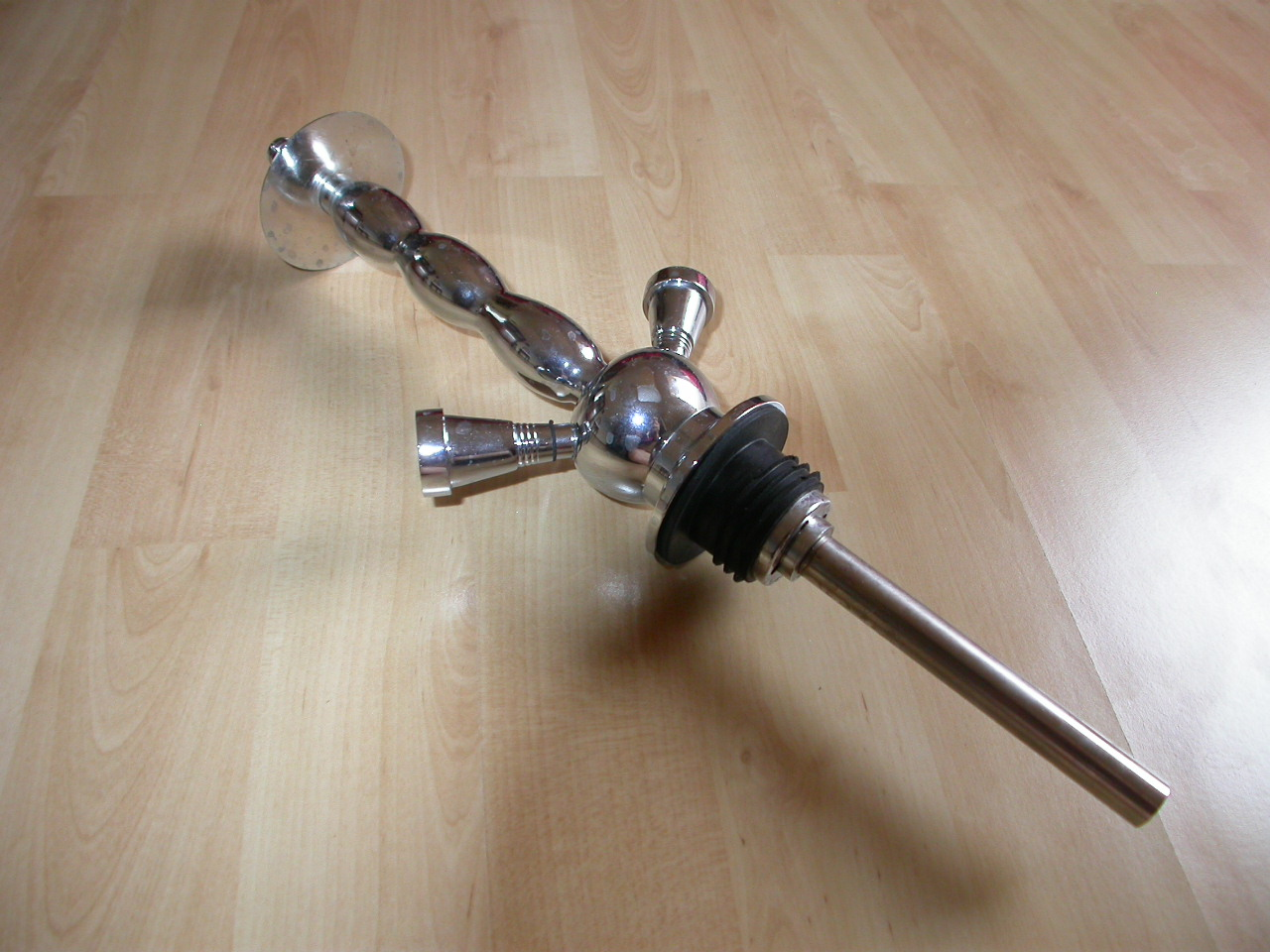 Die Rauchsäule einer Shisha